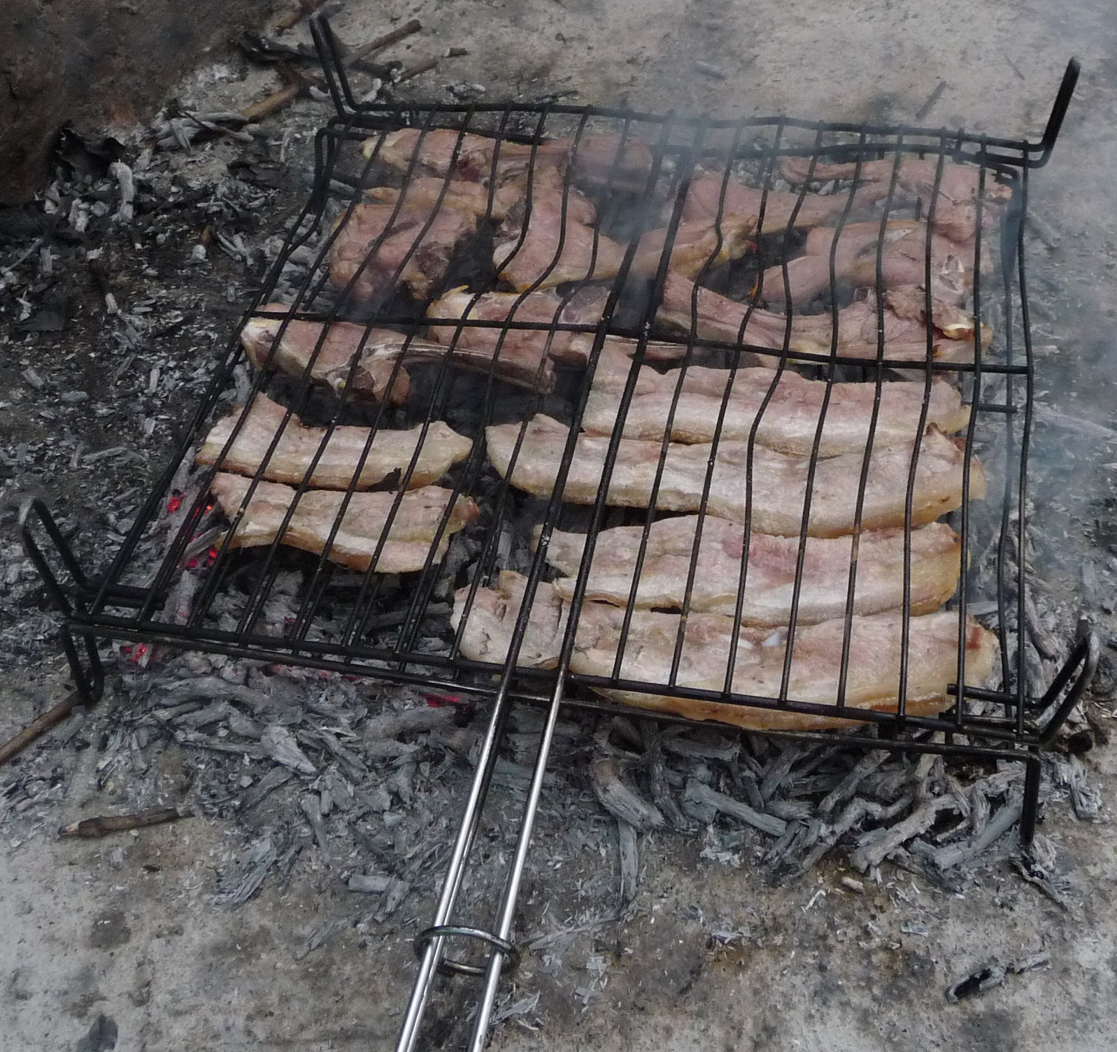 Panceta y chuletillas al sarmiento